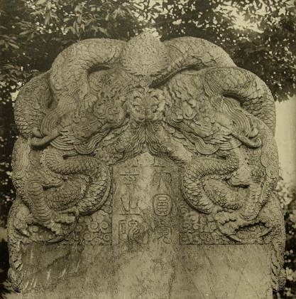 원각사비의 머리부분(碑首)